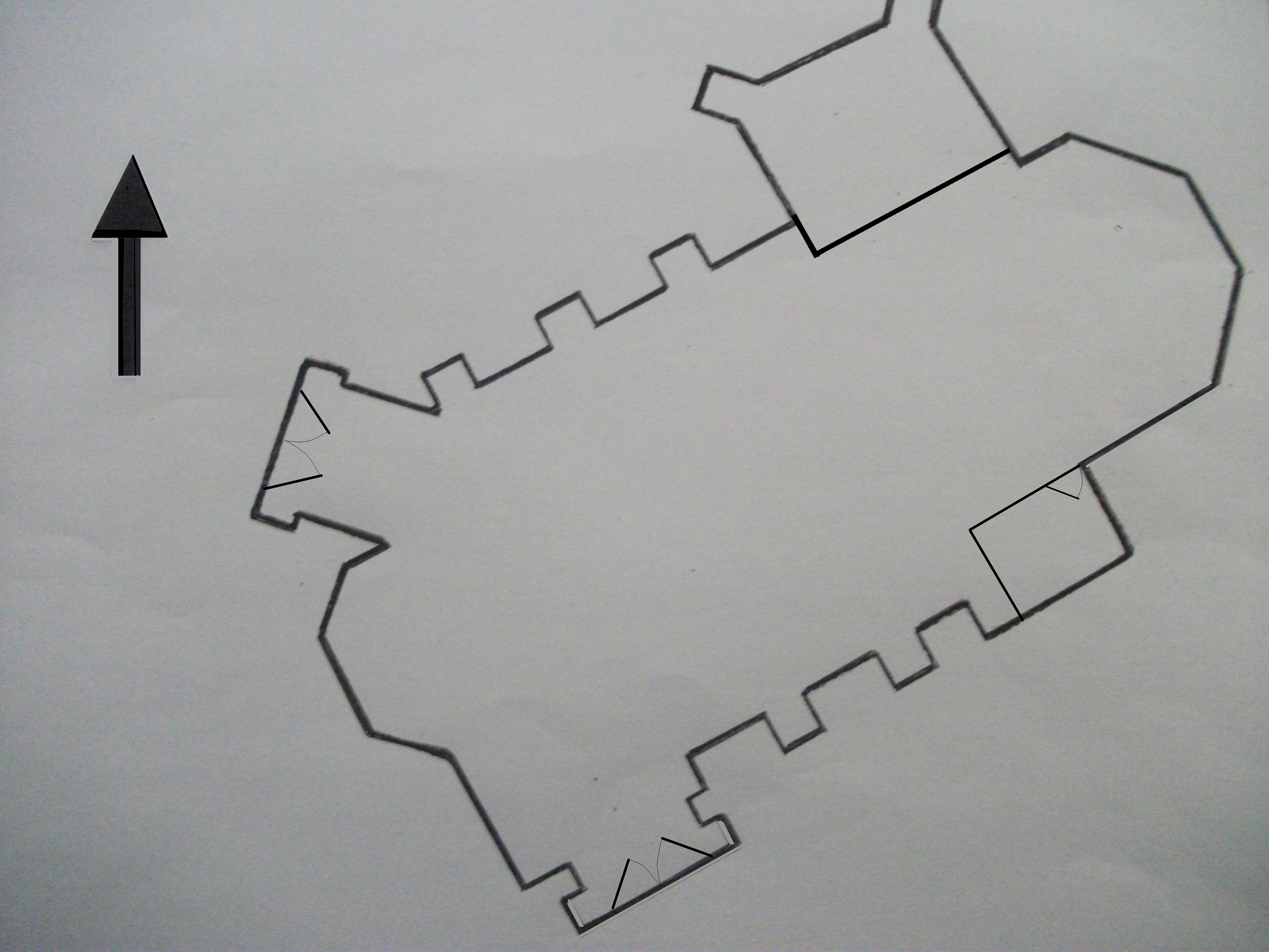 Ground Plan of Jasper Anglican